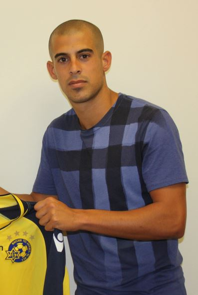 טל בן-חיים